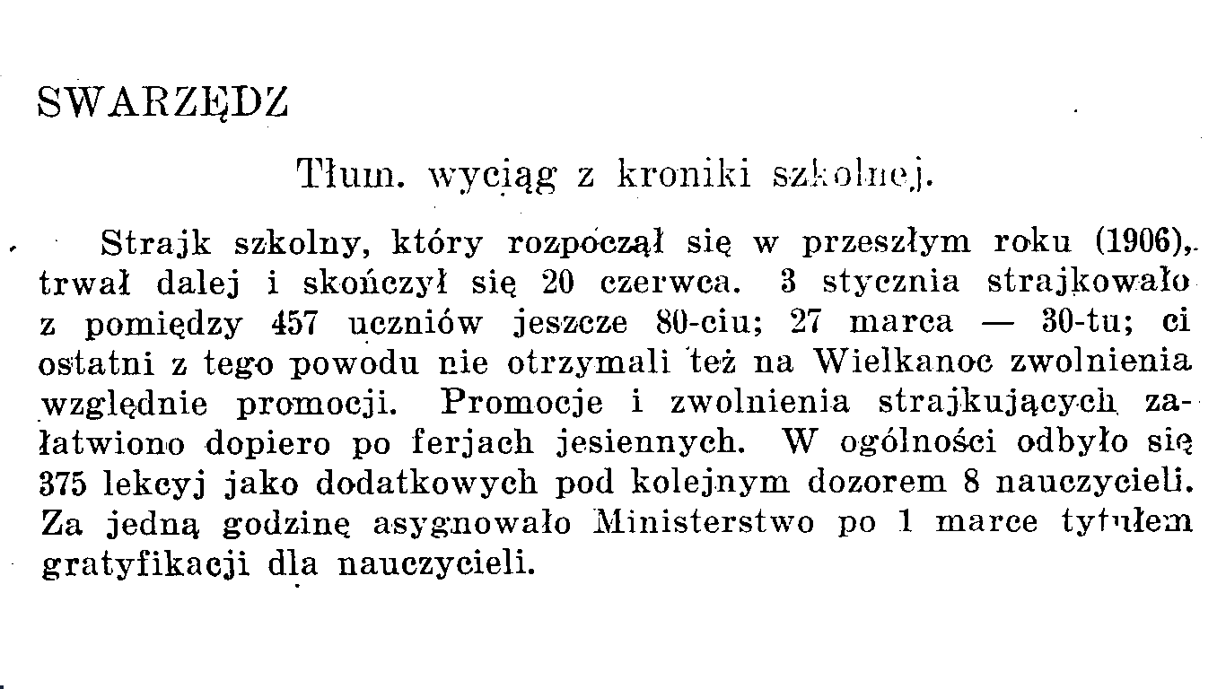 fragment kroniki szkoły ludowej ze Swarzędza